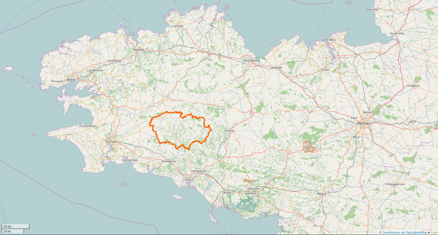 Carte du territoire de Roi Morvan Communaute en bretagne